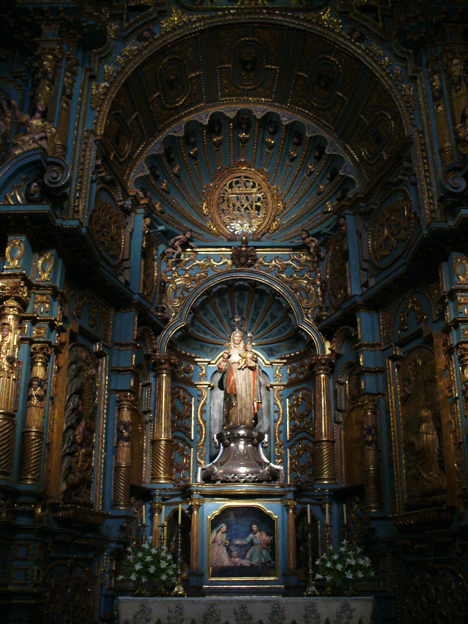 Uma das capelas da catedral.